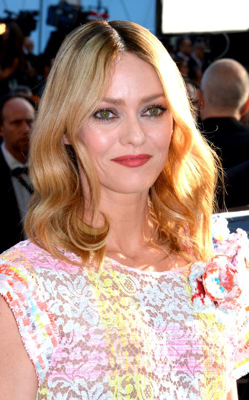 Vanessa Paradis au festival de Cannes